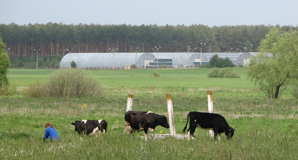 Коровы и фермы